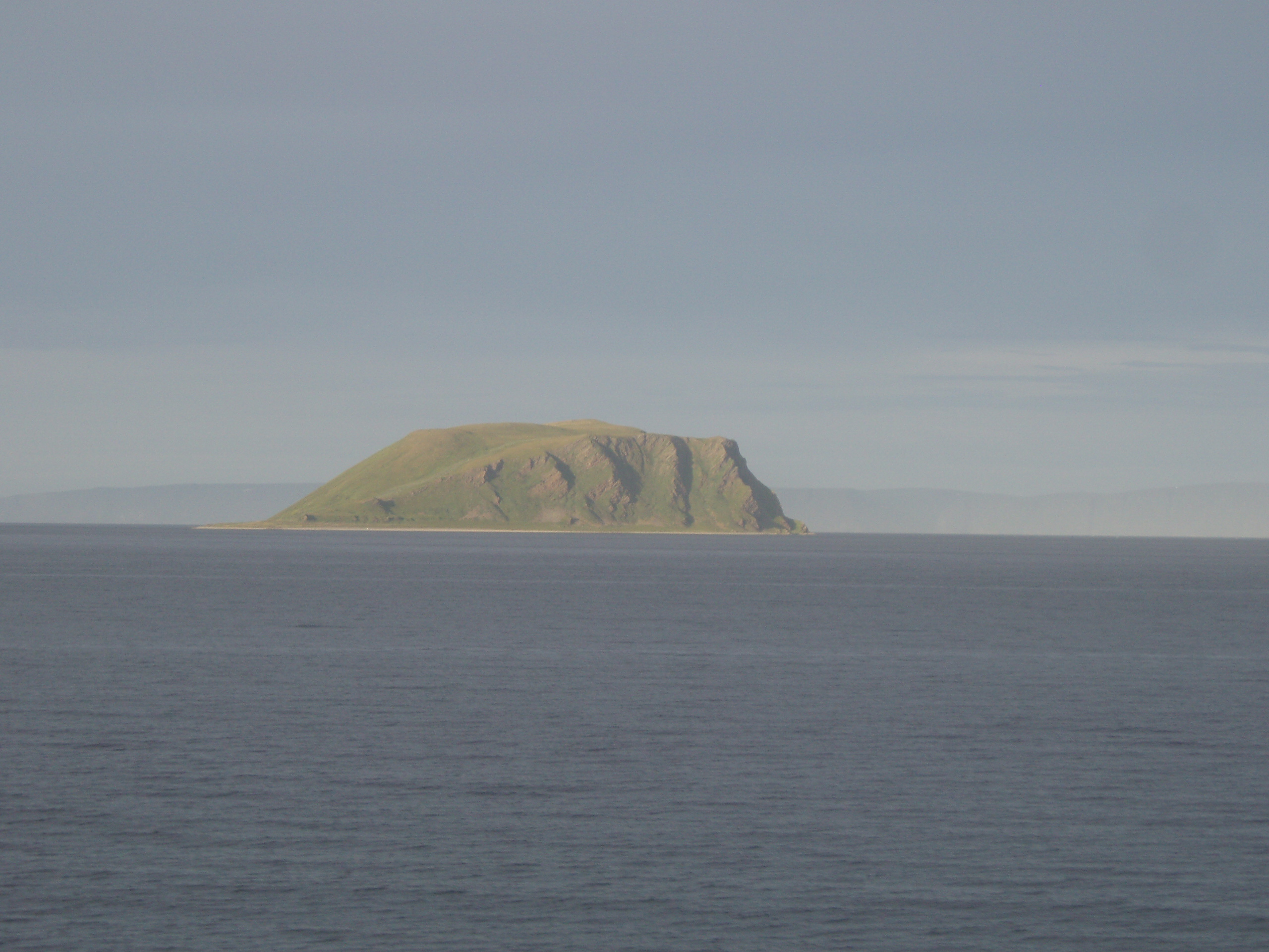 Store Altsula Island in Porsangerfjorden near Honningsvåg and North Cape